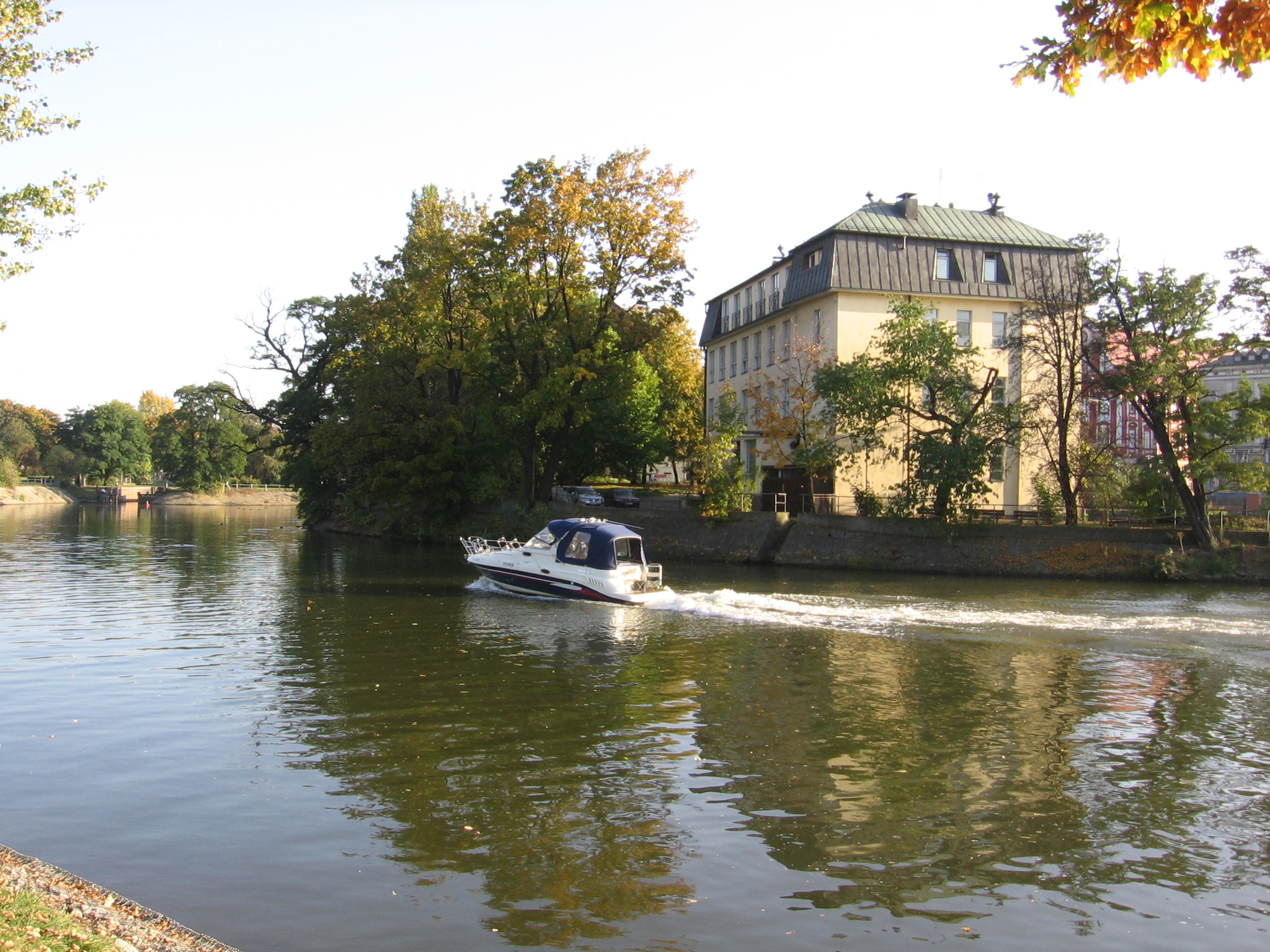 wyspa Tamka we Wrocławiu; widok od strony północno-zachodniej, z Wyspy Słodowej; widoczny budynek Instytutu Biochemii i Biologii Molekularnej Uniwersytetu Wrocławskiego; po prawej za drzewami słabo widoczna czerwona elewacja Ossolineum